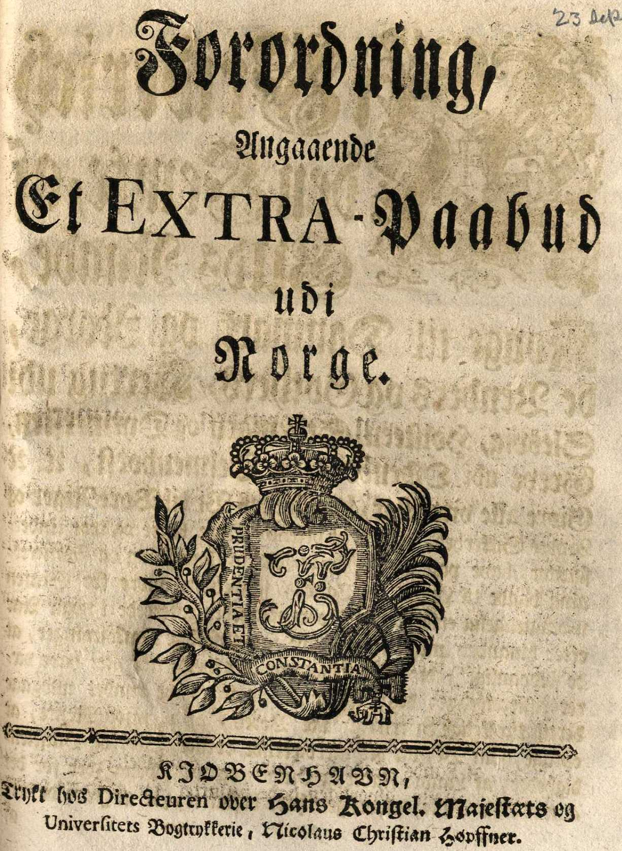 Forsiden av den trykte forordningen om ekstraskatten av 1762.